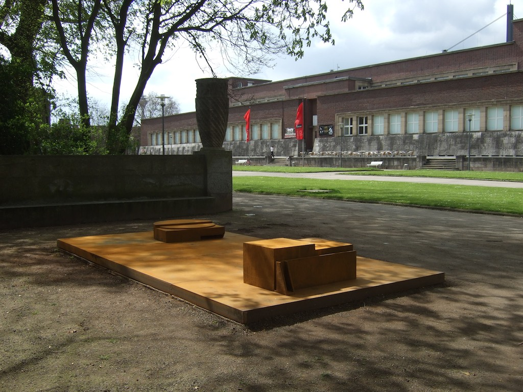 ... es gibt nichts mehr, wohin es sich zurückziehen lässt, Corten Stahl, Düsseldorf 1988; 45 x 250 x 500 cm Im Ehrenhof Museum Kunstpalast, Düsseldorf